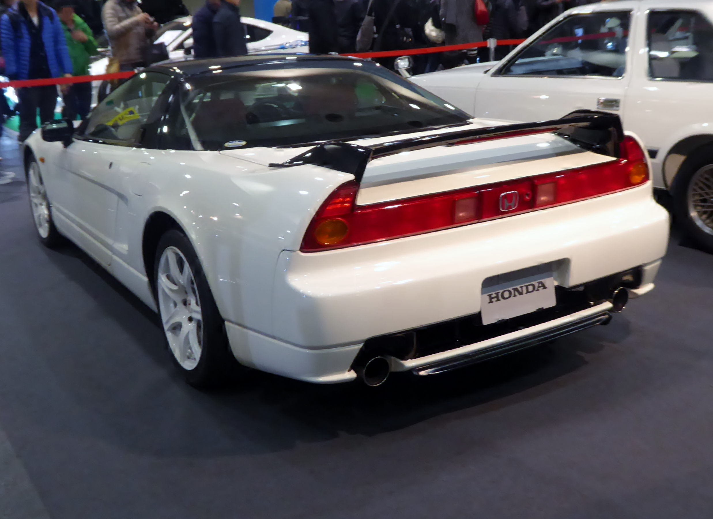 大阪オートメッセ2017に於いて2002年型ホンダ・NSX-Rを撮影。